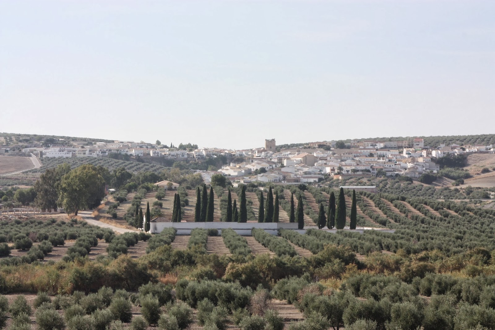 Higuera de Calatrava